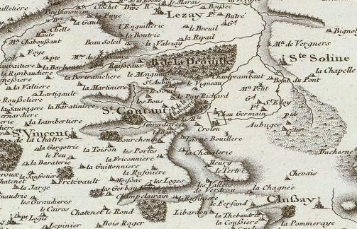 Saint-Coutant (79) sur la carte Cassini de France